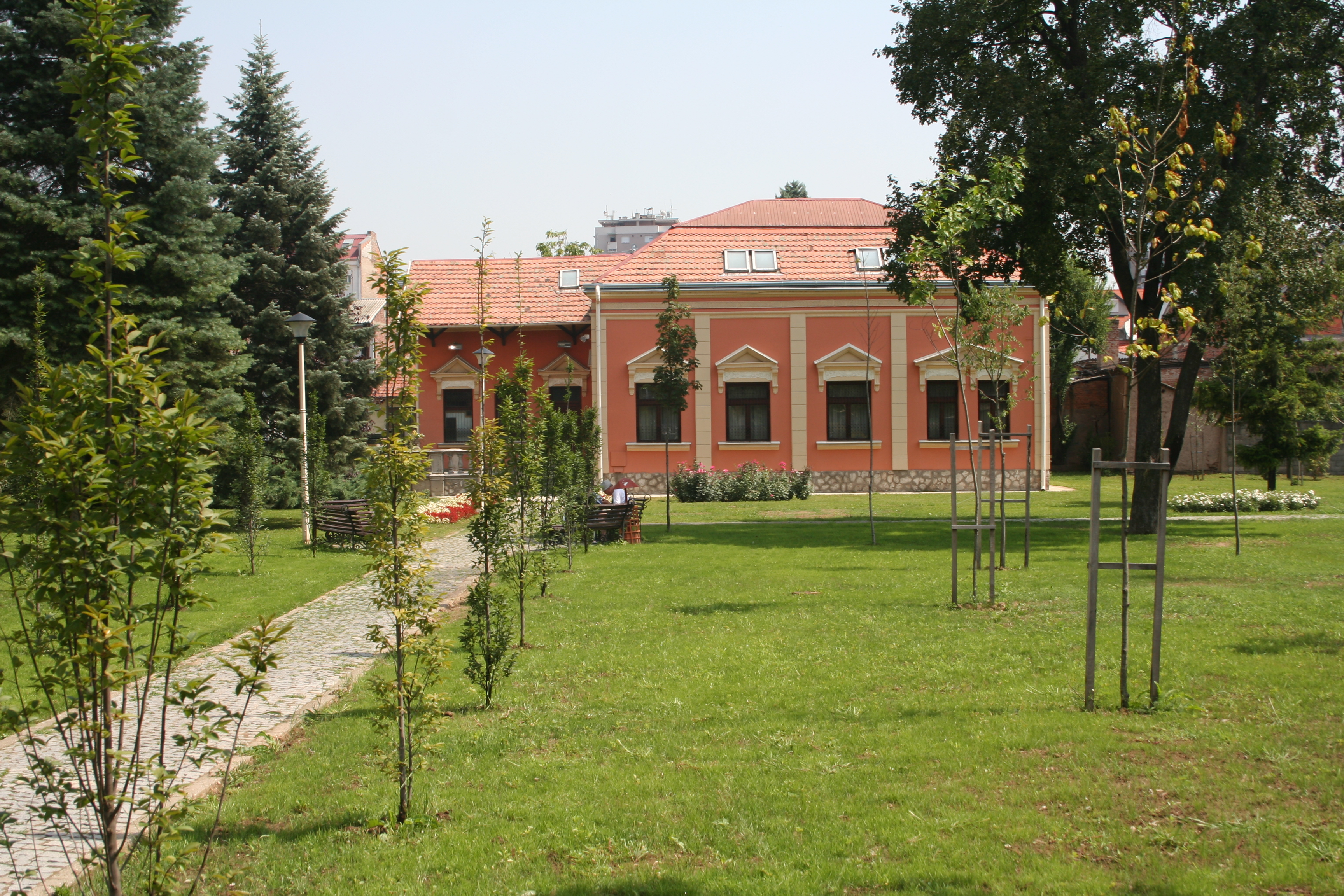 Dunjića kuća, Šabac